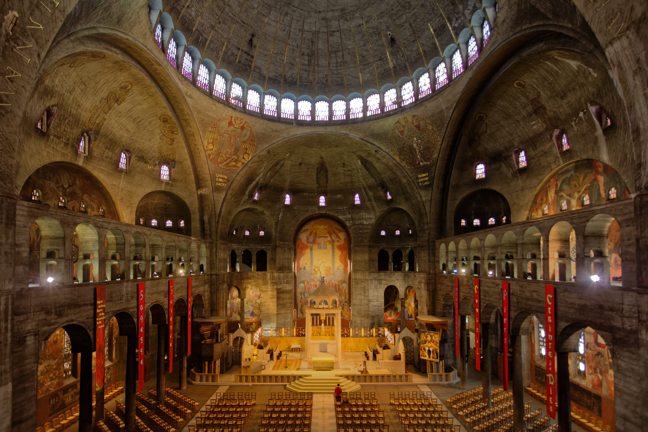 Église du Saint-Esprit, Paris 12 .